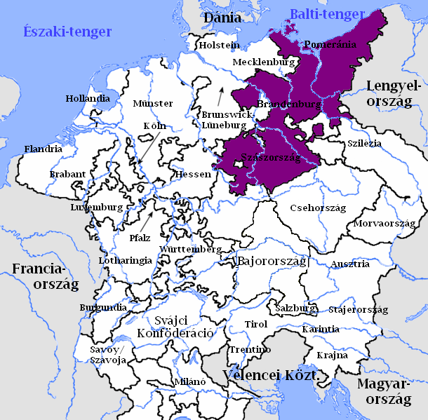 A felső-szászországi körzet a Német-római Birodalomban